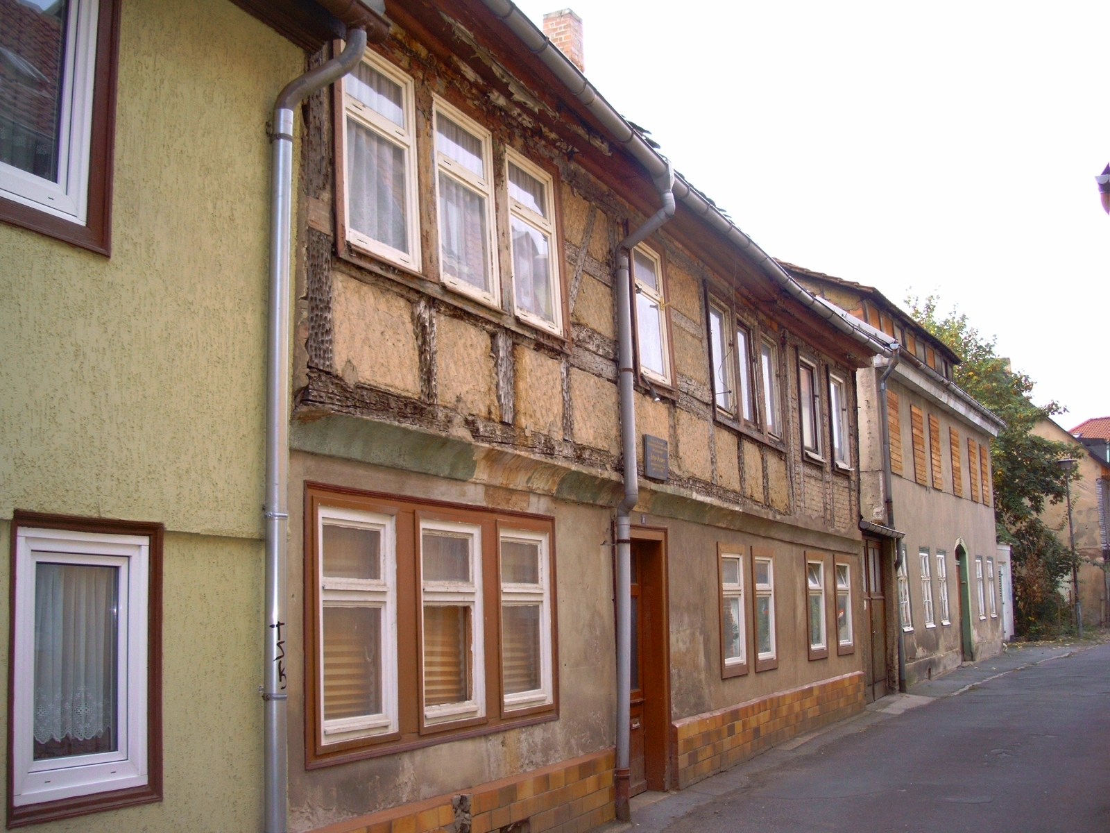 Wohnhaus Anton Sommer